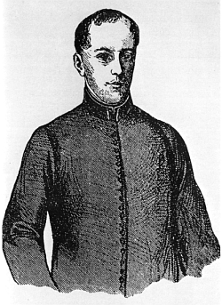 Thomas Pöschl Abb im Forum Oberösterreichische Geschichte